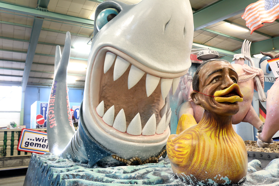 Präsentation der MCV-Motivwagen für den Mainzer Rosenmontagszug 2015. Präsident Barack Obama als lame duck von dem republikanischen Hai gejagt. Im Hintergrund: US amerikanische Chlorhühnchen als Symbol für TTIP.